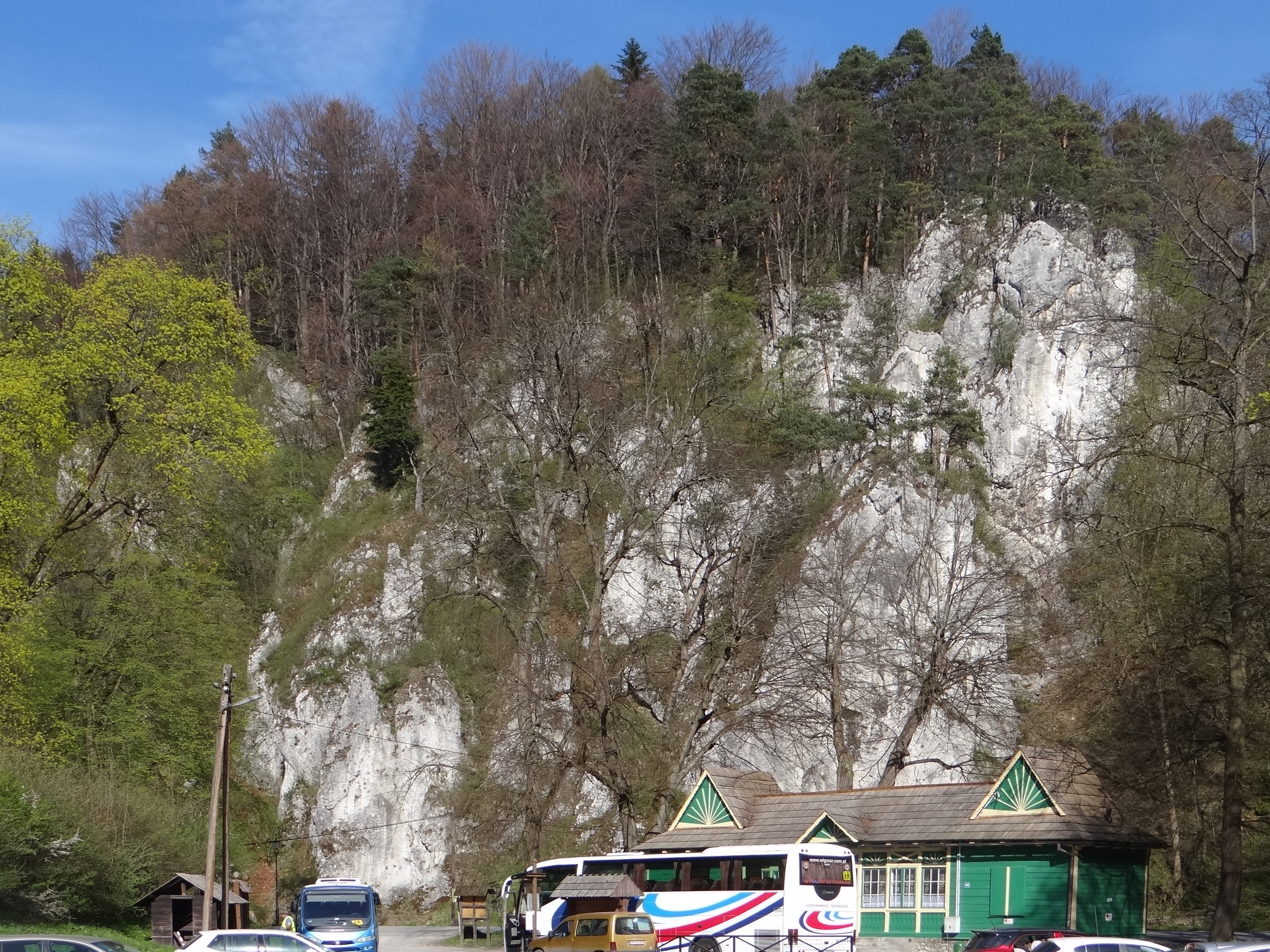 Skały Nad Trzaską w Ojcowskim Parku Narodowym